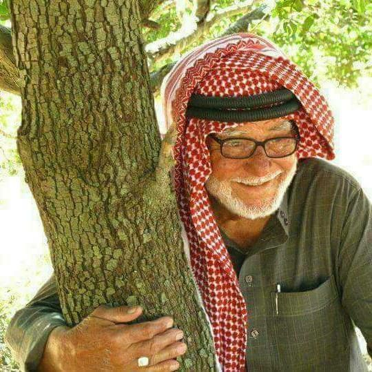 الشاعر عبدالعزيز القرشي